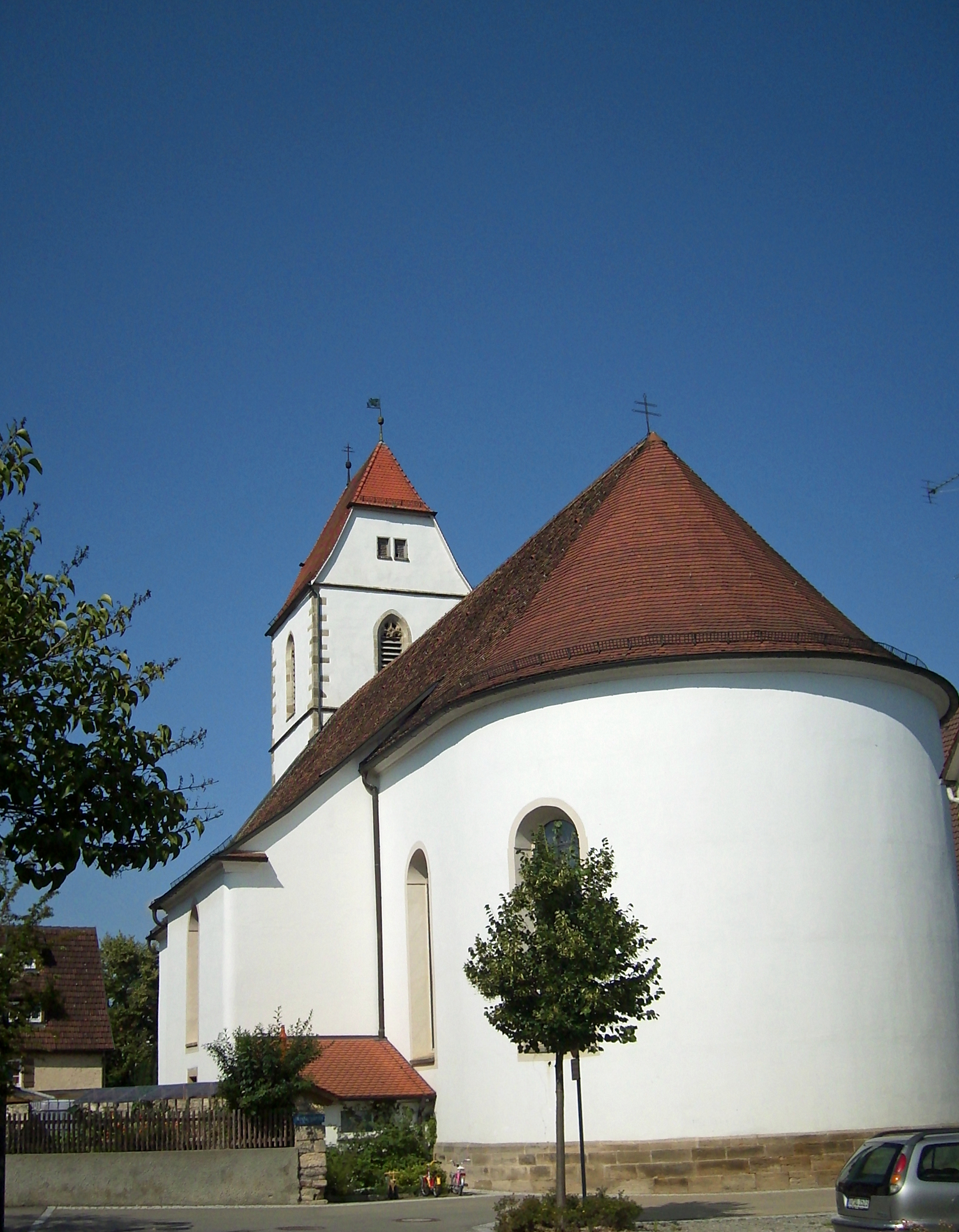 Hirrlingen Kirche Hirrlingen